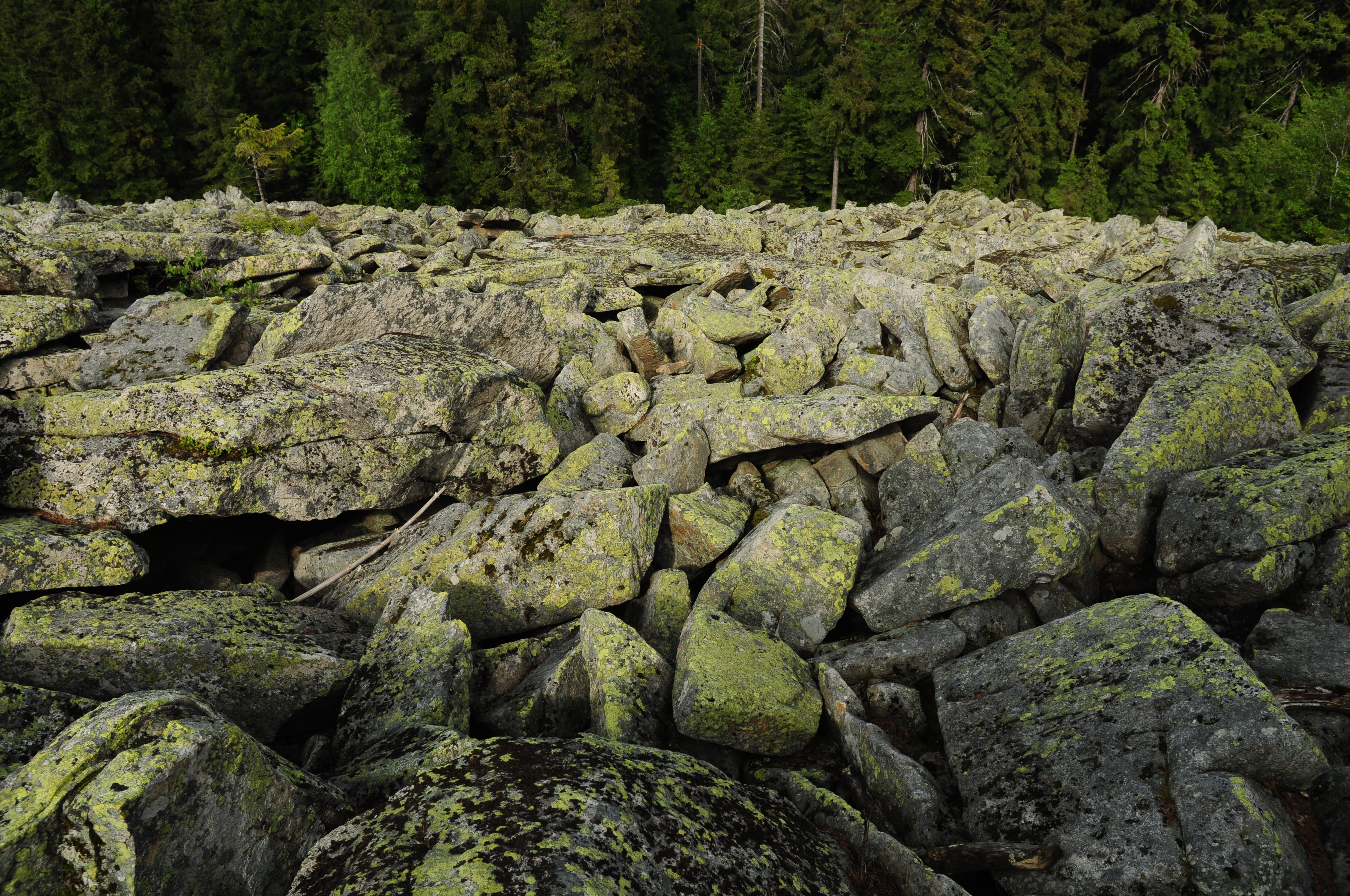 Naturschutzgebiet 00023.10